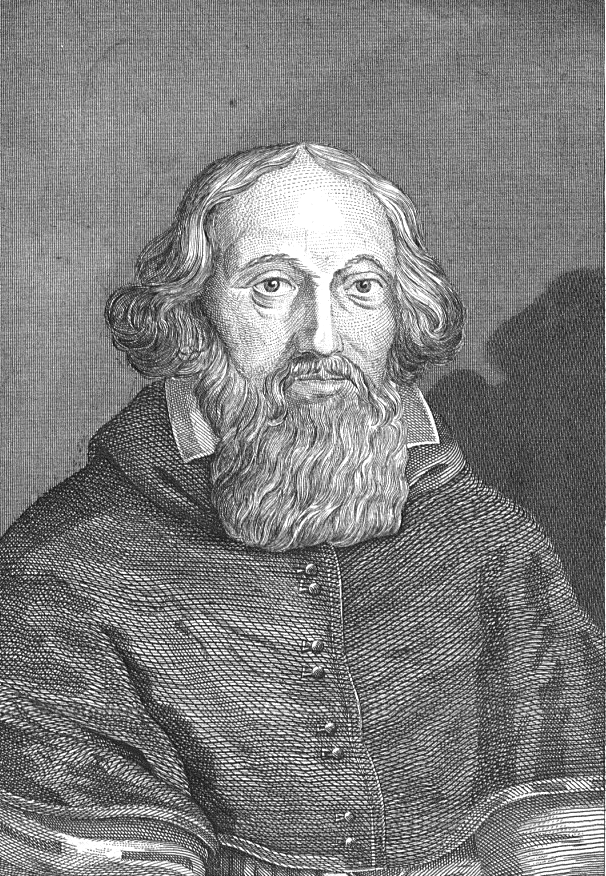 Stanisław Łubieński